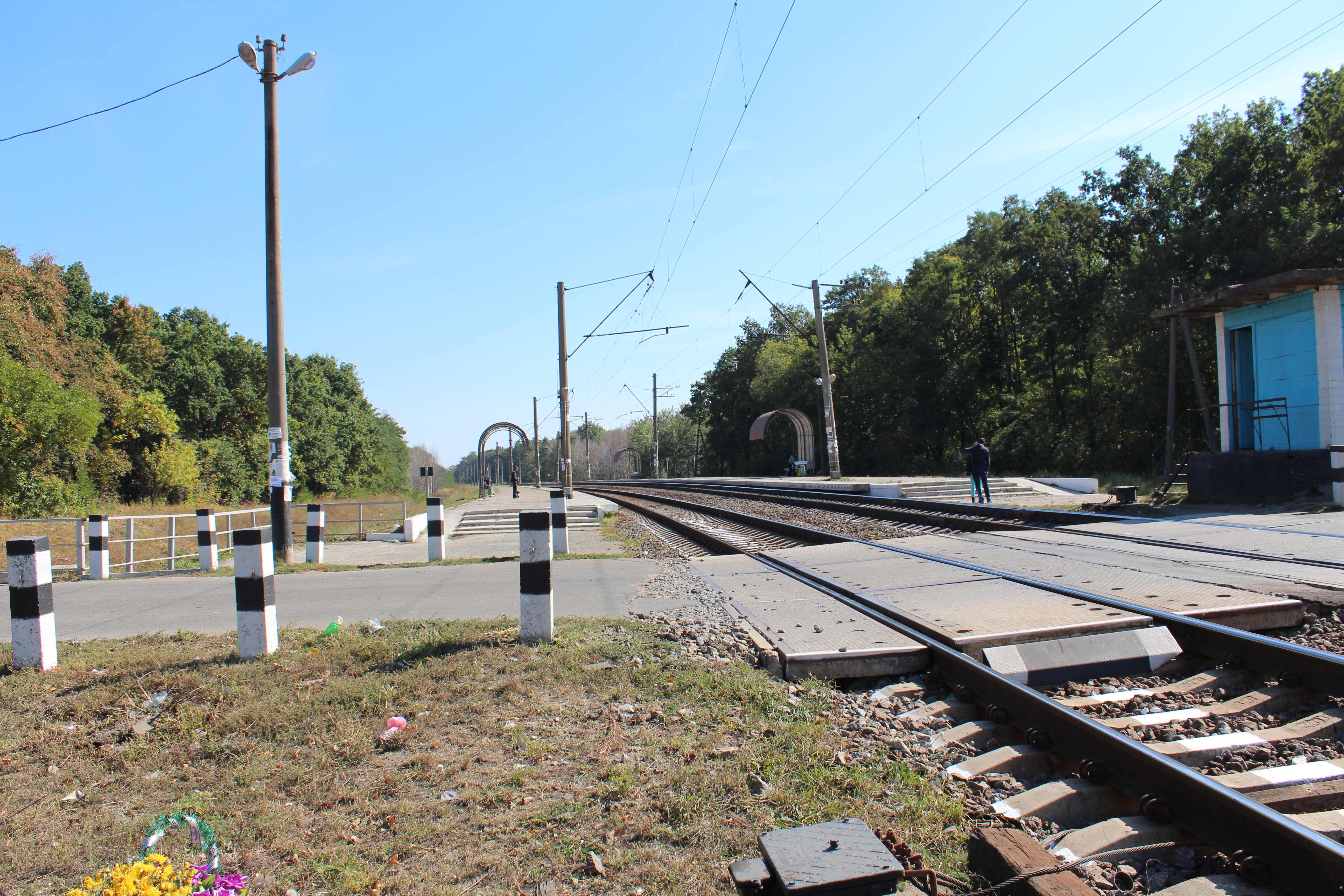 Загальці. Залізнична платформа